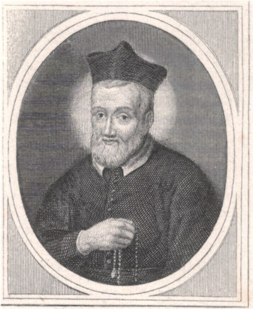 Неизвестный автор. Гравюра с изображением Антонио Грасси, блаженного (XVIII-XIX век)